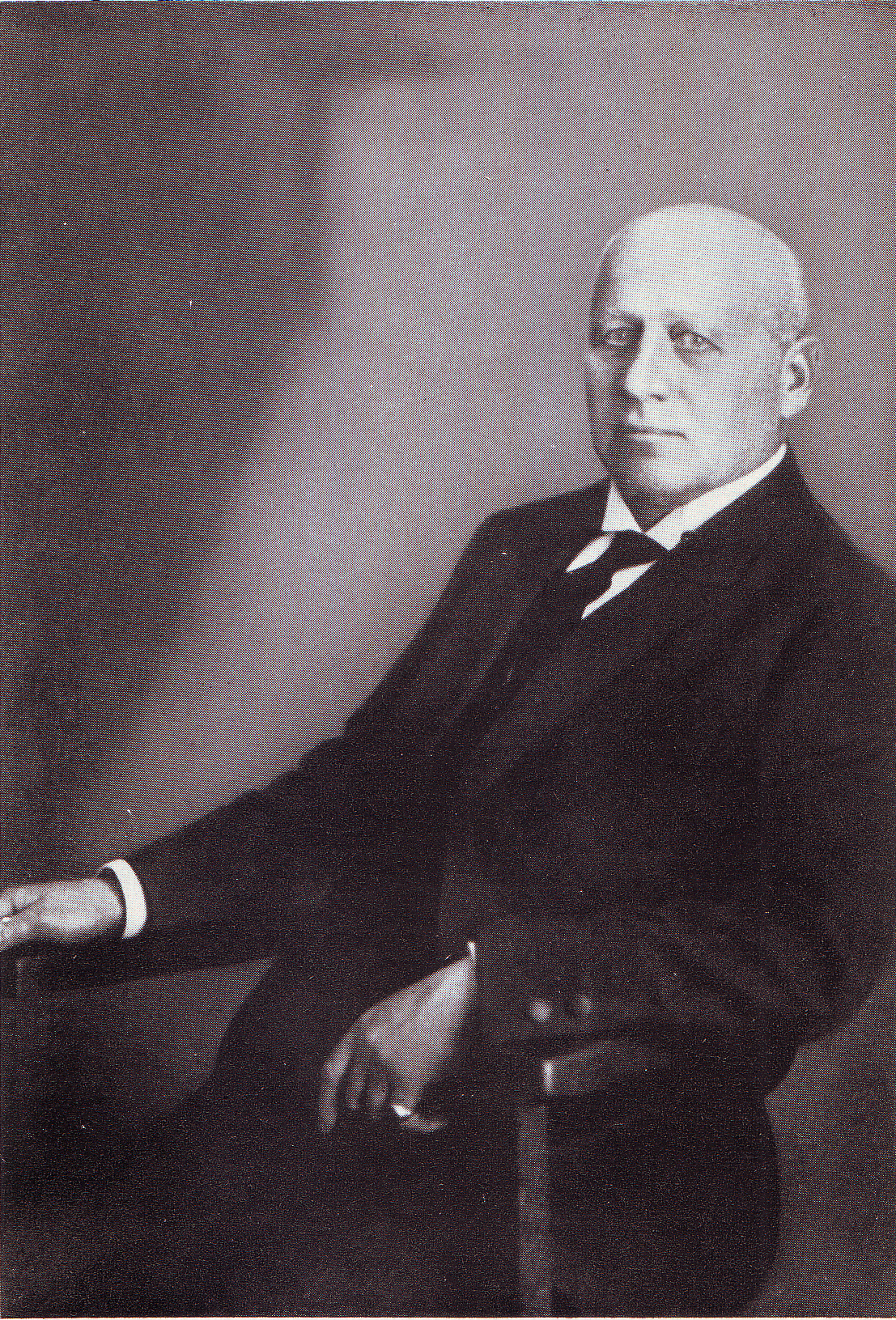 Rauchwarenhändler Richard König senior, Porträt.